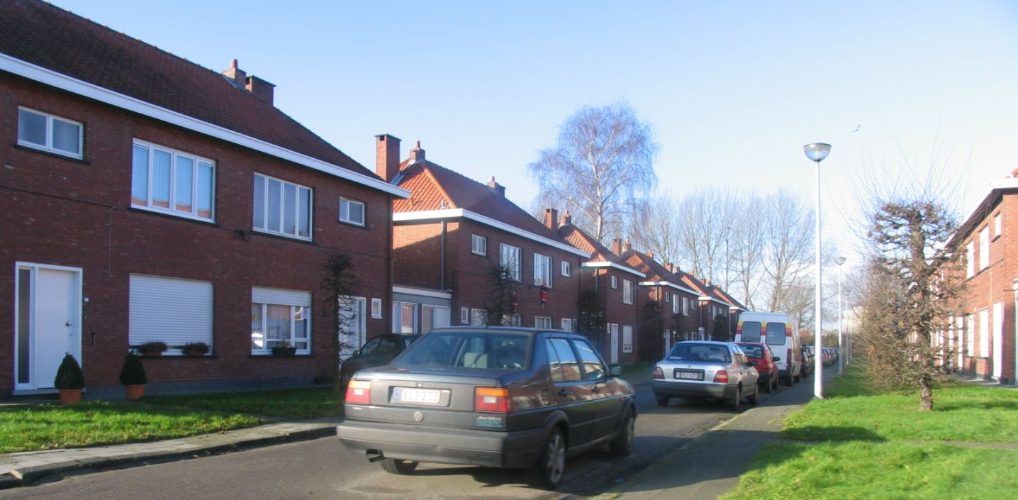 Mechelen, Otterbeek, Spreeuwstraat (noordwaarts). Foto Marc Alcide 25 december 2005